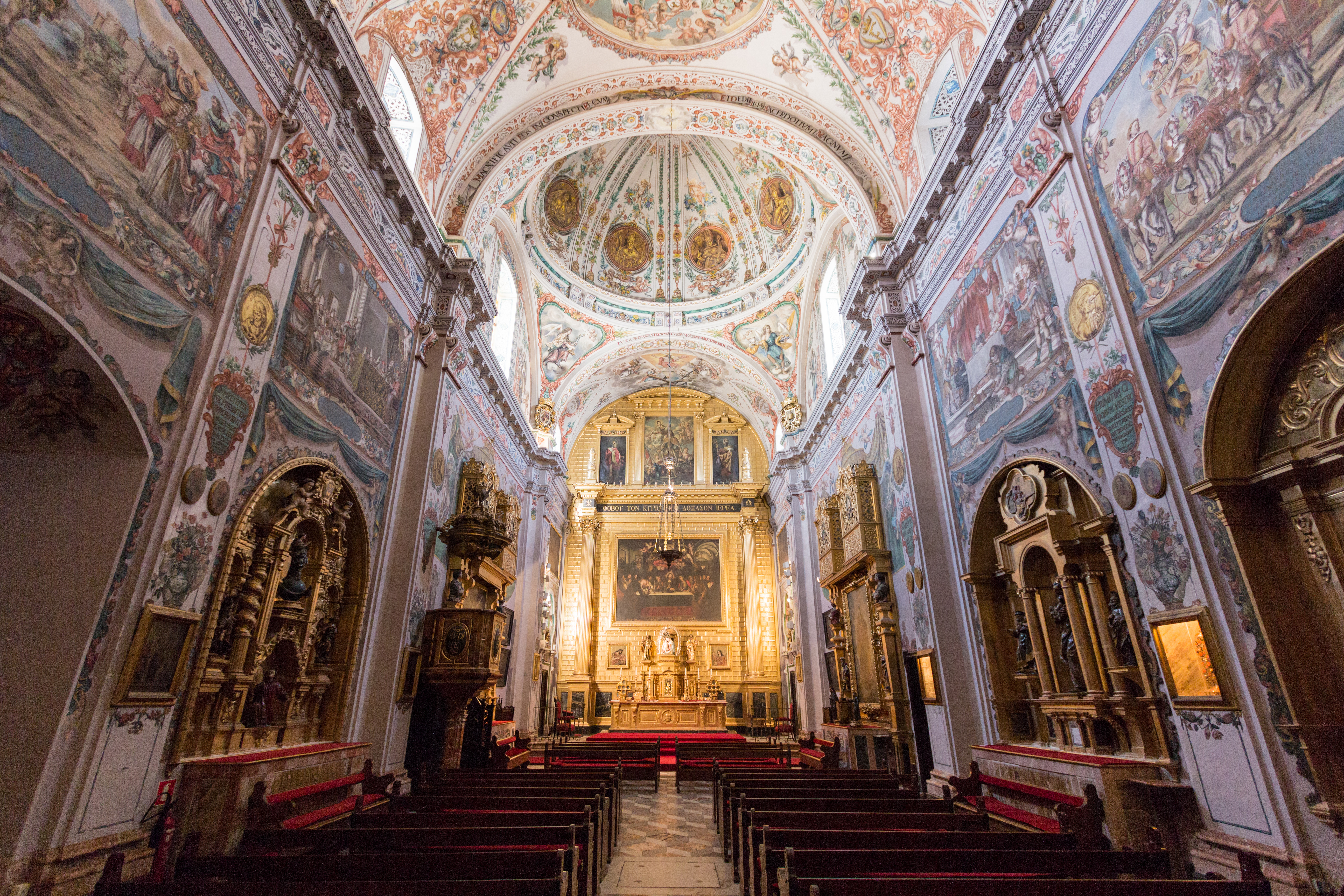 Vista general del interior de la iglesia del Hospital de los Venerables de Sevilla, (Spain).